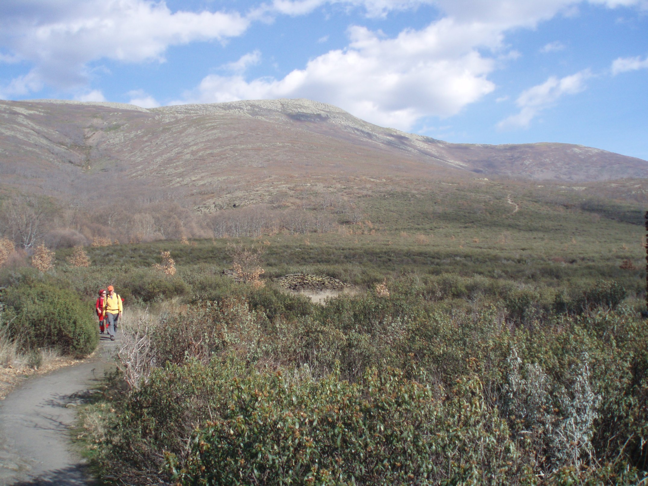 Cara oeste del Pico Ocejón (Sierra de Ayllón, España).